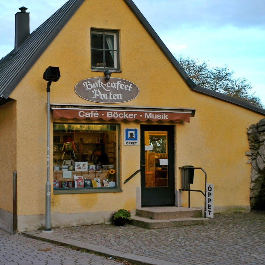 スウェーデンのヴィスビー市